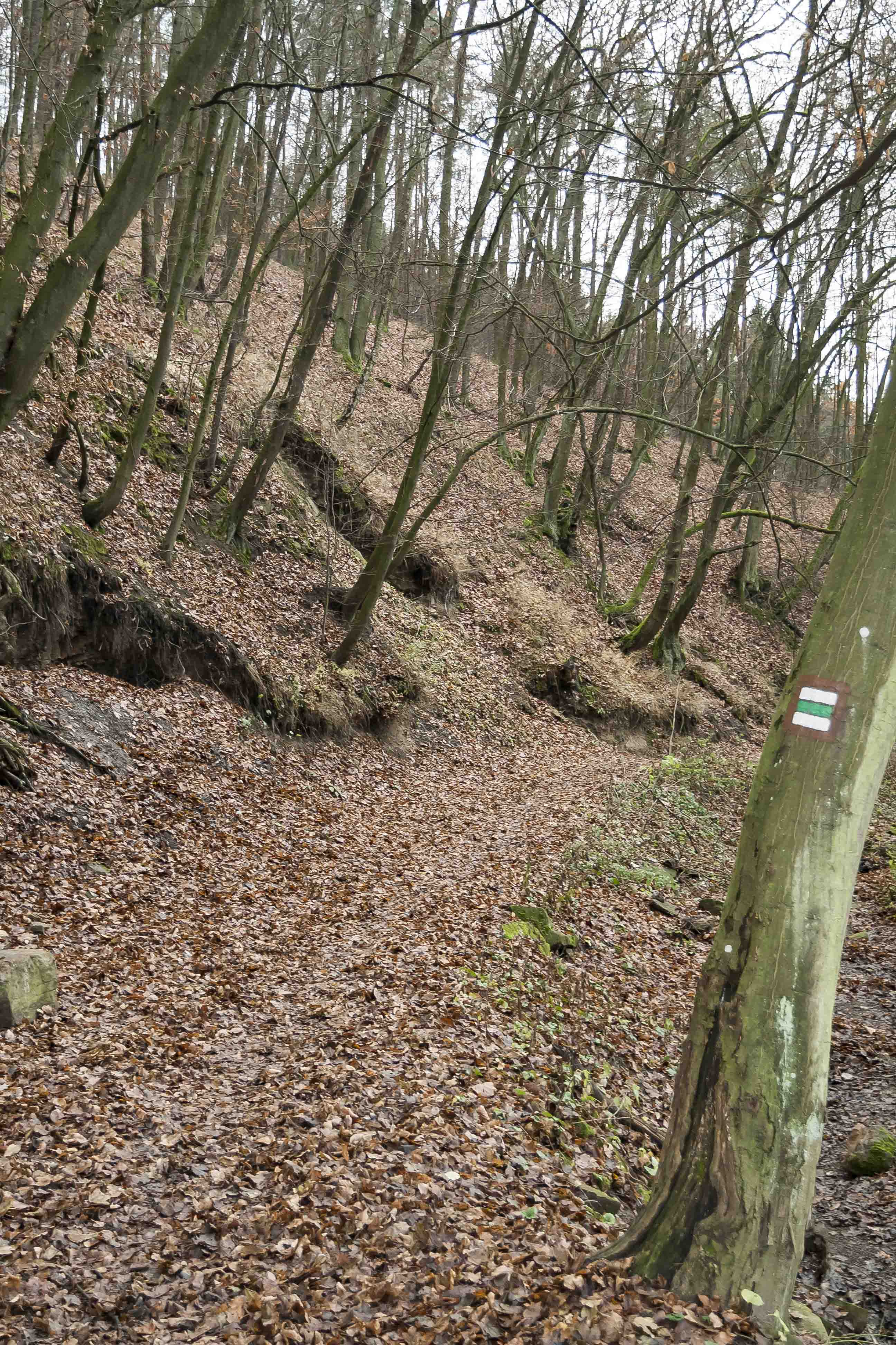 Rybičková skála